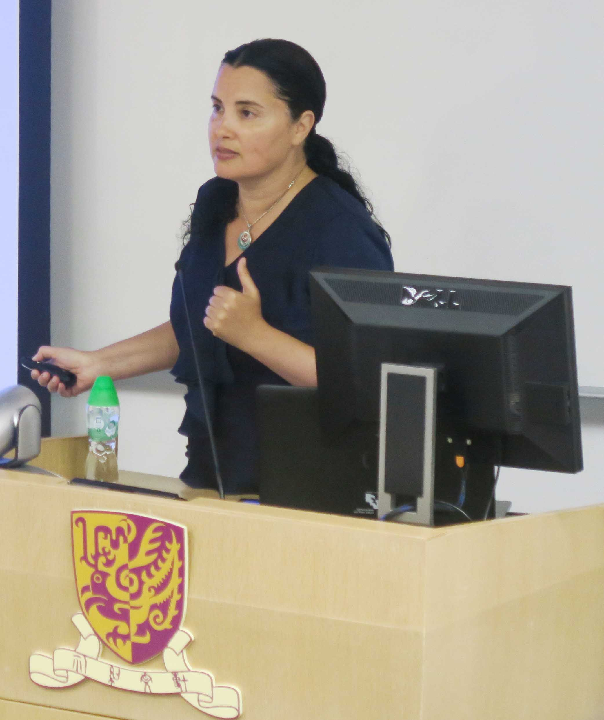 שירה כנפו מרצה באוניברסיטת הונג קונג